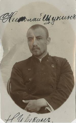 Nikolai Štšukin Tartu Keiserliku Ülikooli üliõpilasena 1904 (?)